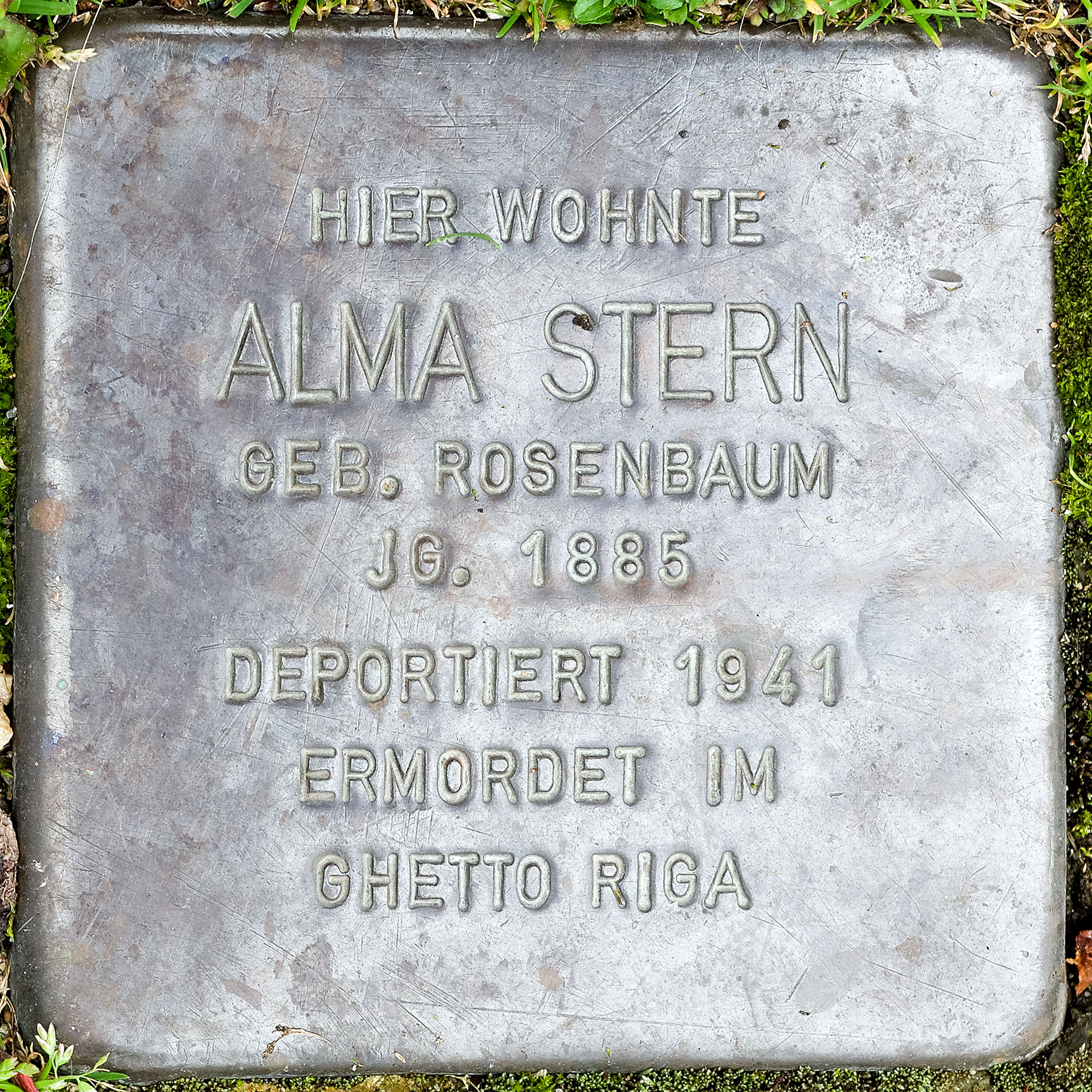 Stolpersteine in Viersen: Stern, Alma